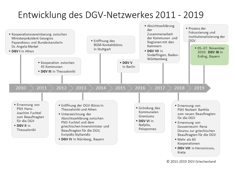 Entwicklung des DGV - Netzwerks